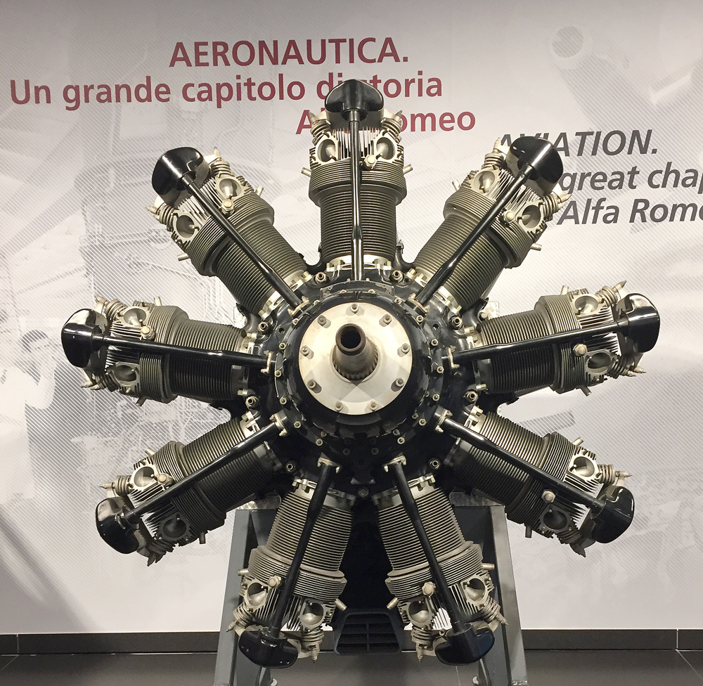 The Alfa Romeo aero engine 128RC from 1939 on display at the Alfa Romeo Museum in Arese, Italy